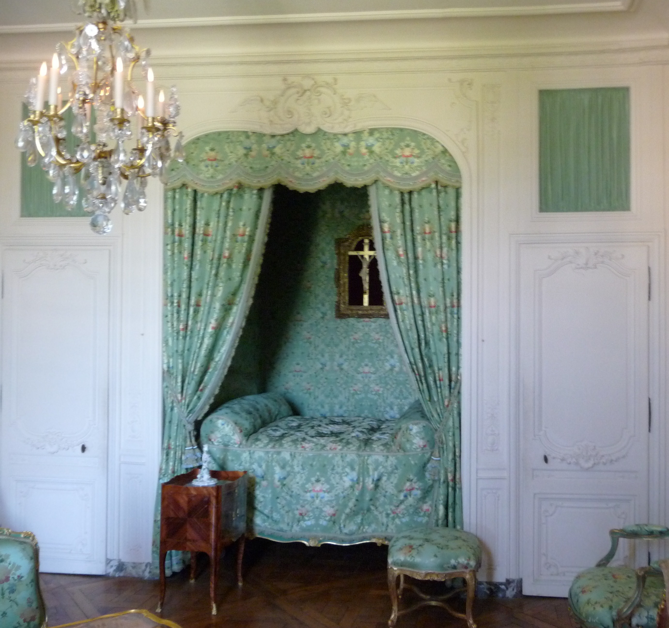 Lit de la chambre de Mme de Pompadour, dans ses appartements du château de Versailles.